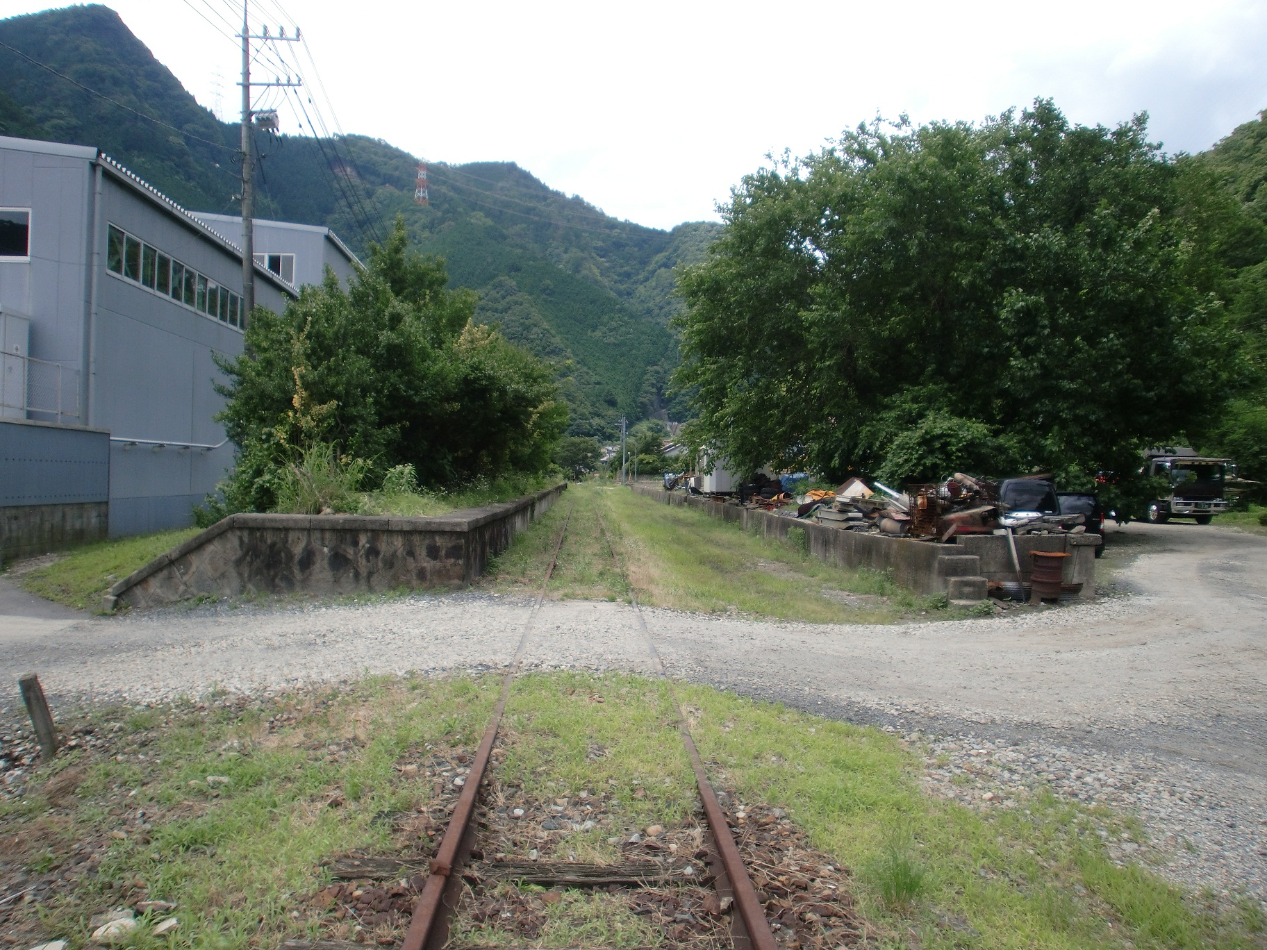 可部線布駅跡地